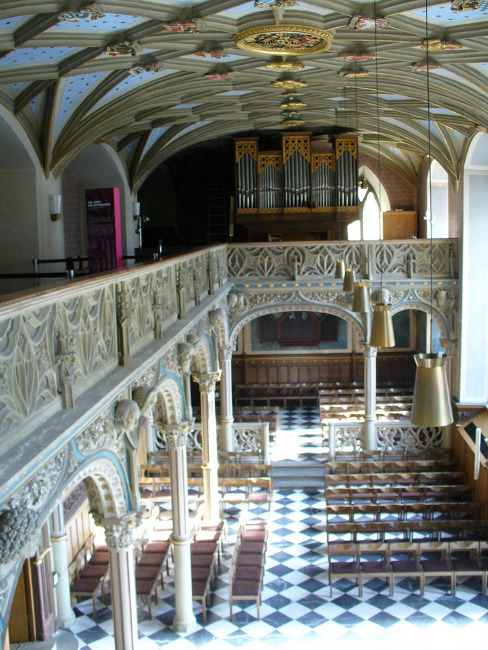 Stuttgart Altes Schloss Schlosskapelle